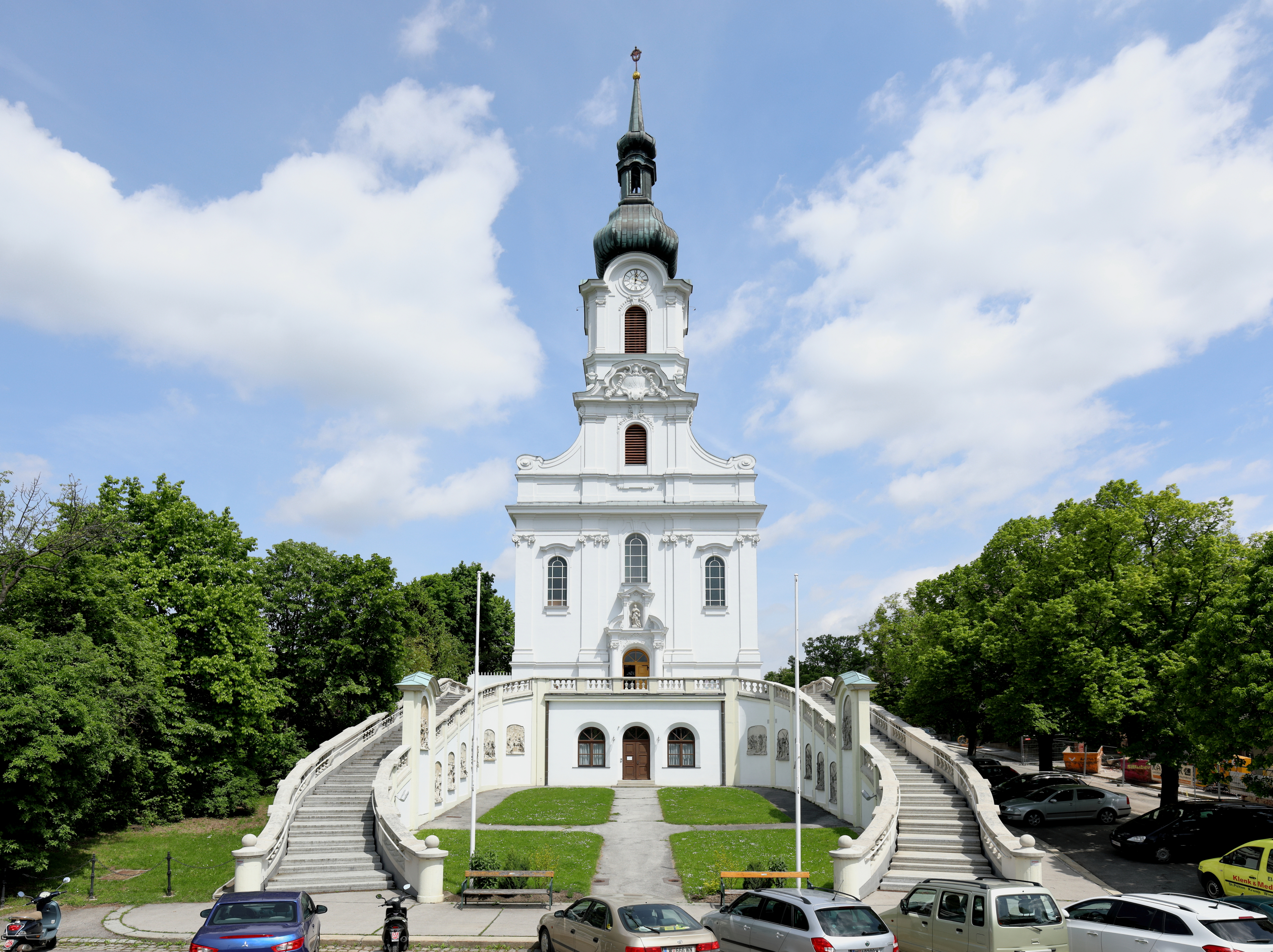 Südwestansicht der Filial- und Wallfahrtskirche „Mariä Schmerzen“ in Grinzing, ein Bezirksteil des 19. Wiener Gemeindebezirkes Döbling.Die neobarocke Kirche wurde ab 1909 anstelle einer Kapelle von den Architekten Gustav Orglmeister (Planung) und Franz Kupka (Entwurf und Ausführung) erbaut und am 30. April 1910 geweiht. Hinter der Unterkirche befindet sich die Esders-Gruft, in der auch Stefan Esders bestattet ist, der zum Großteil die Kirche finanzierte. Die realistisch-ausdrucksvollen Kreuzwegbilder an der Innenseite der Freitreppe sind Werke der Bildhauer Paul Paintl (1862–1946) und Franz Abel (1860–1919).